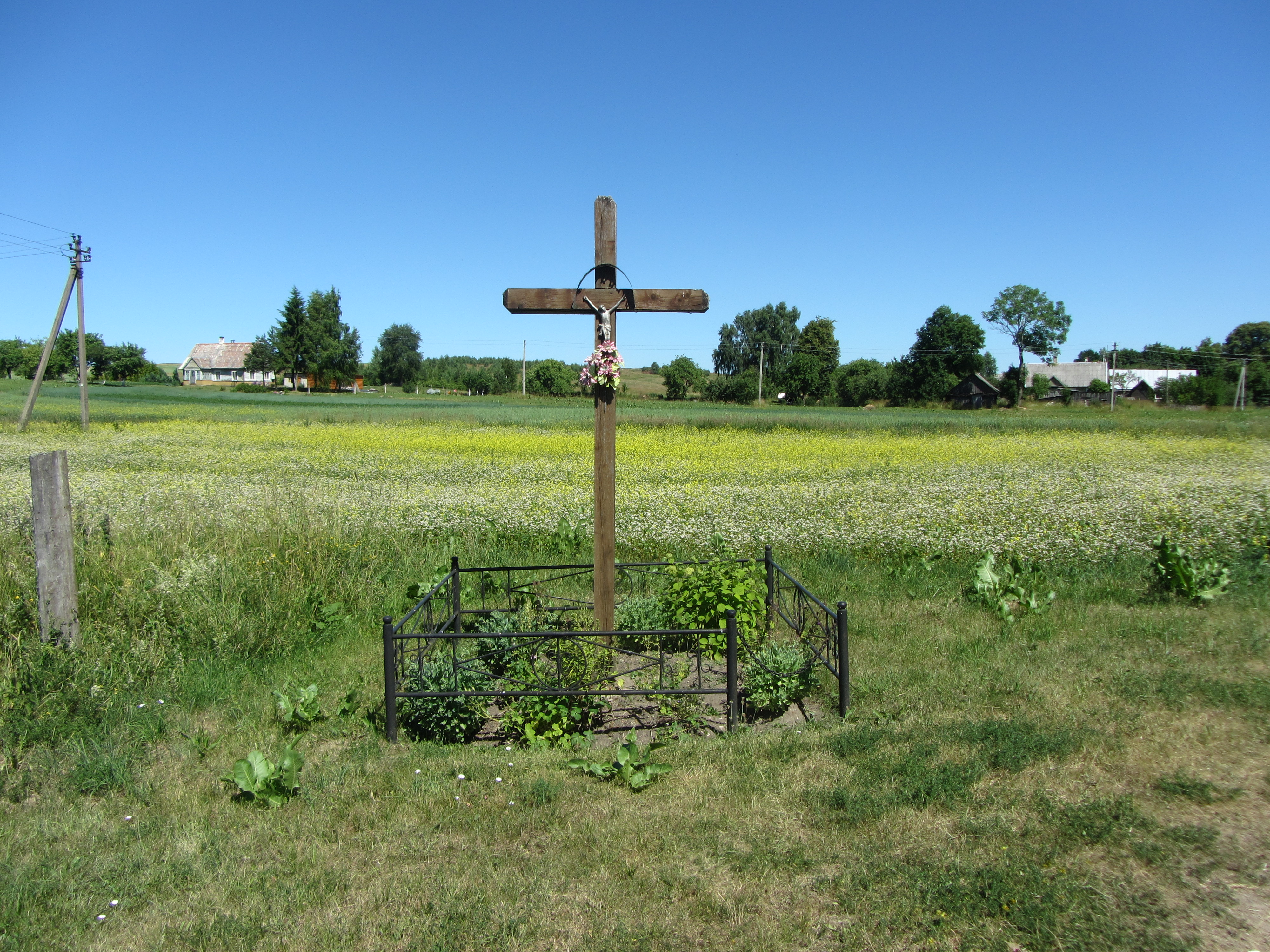 Salkininkai, Lithuania